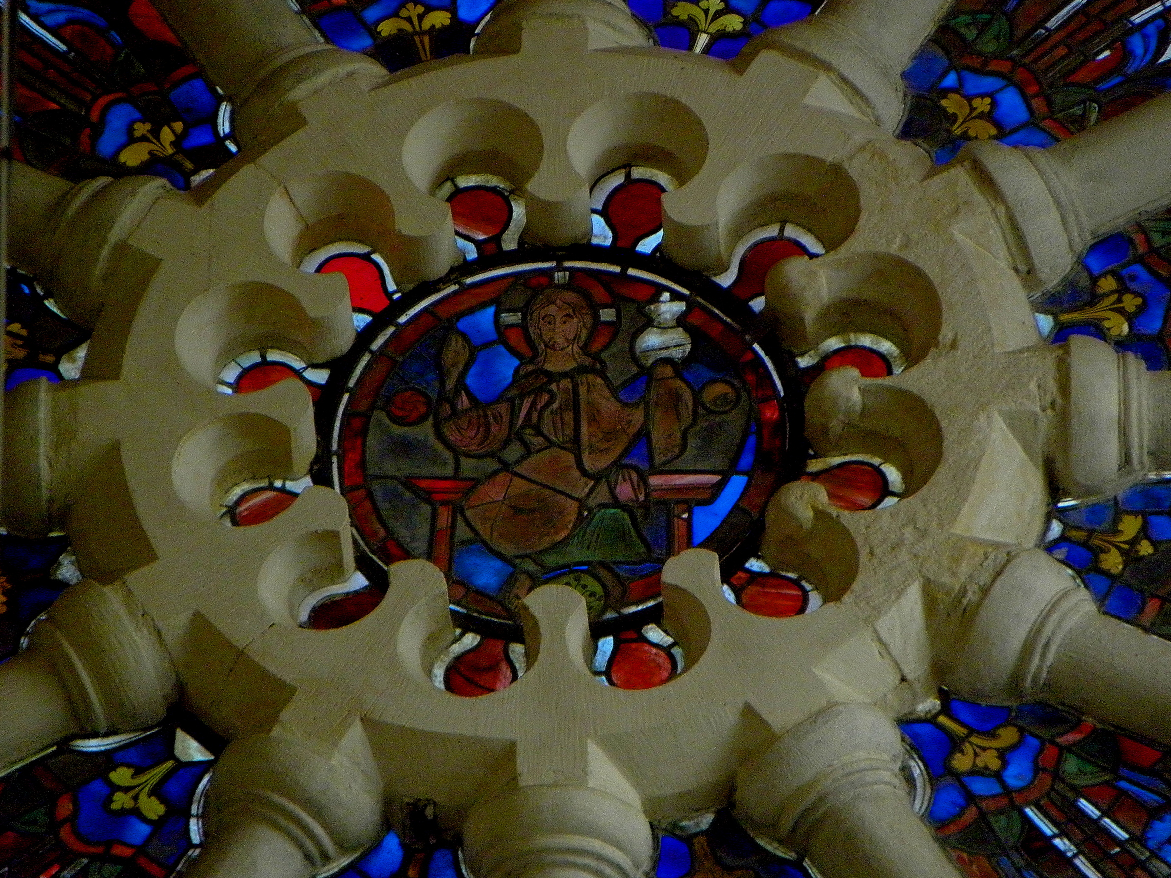 Rose orientale de l'église Saint-Étienne de Brie-Comte-Robert (77). Détail.